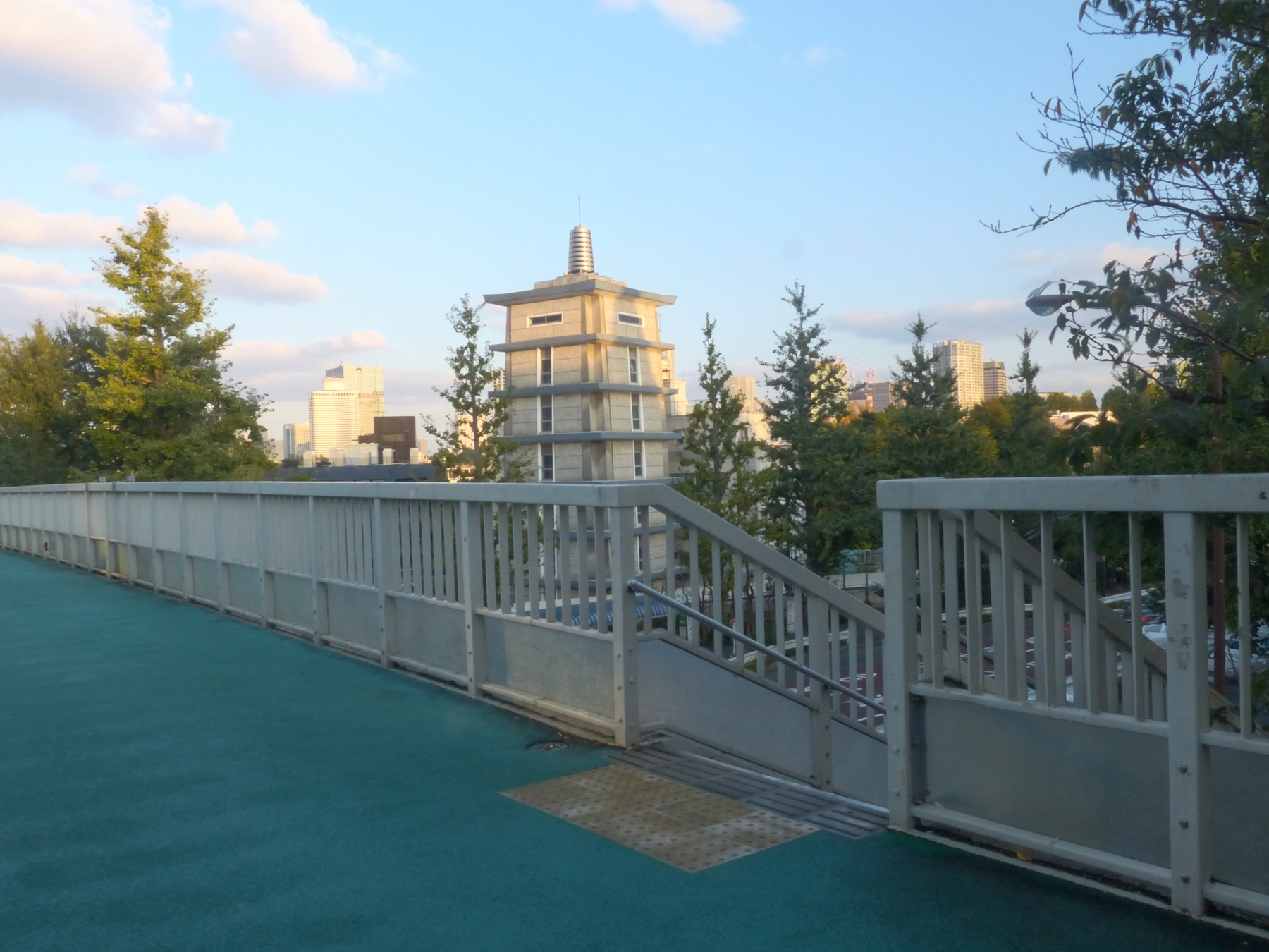 映画『君の名は。』で度々登場する、JR信濃町駅南側の歩道橋。